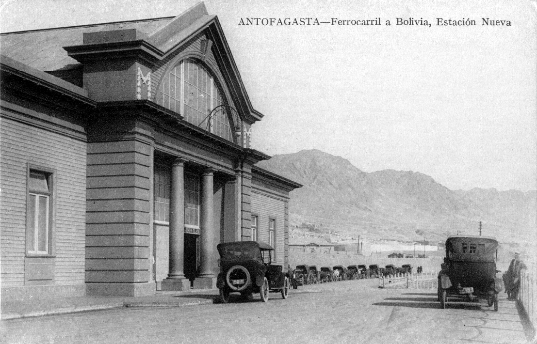 Acceso a la estación de ferrocarriles de Antofagasta (denominada "Estación Nueva"), circa 1920.